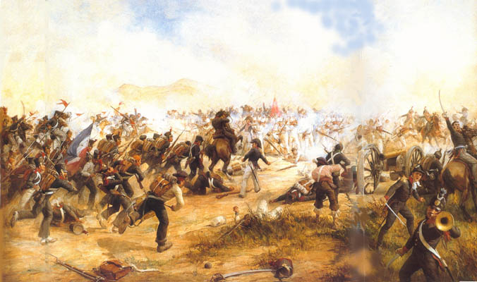 Batalla de Maipu